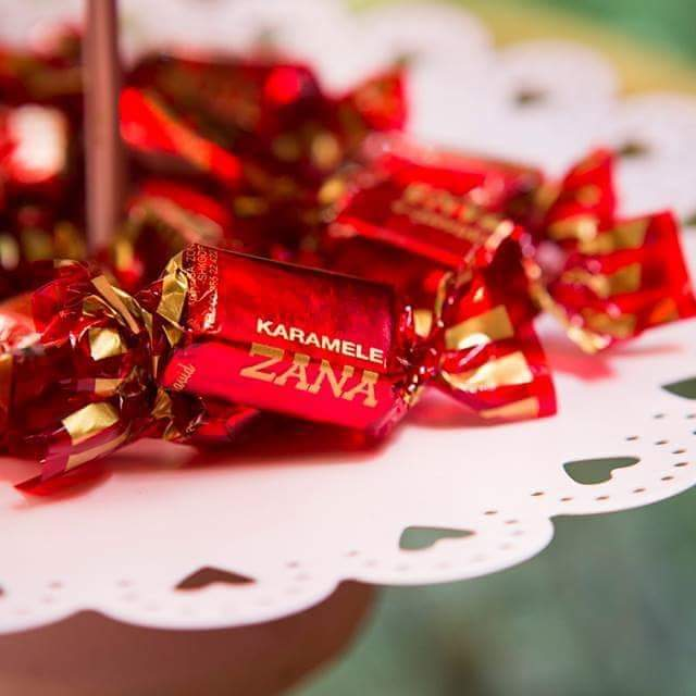 Karamele "Zana" te "Komiteti".